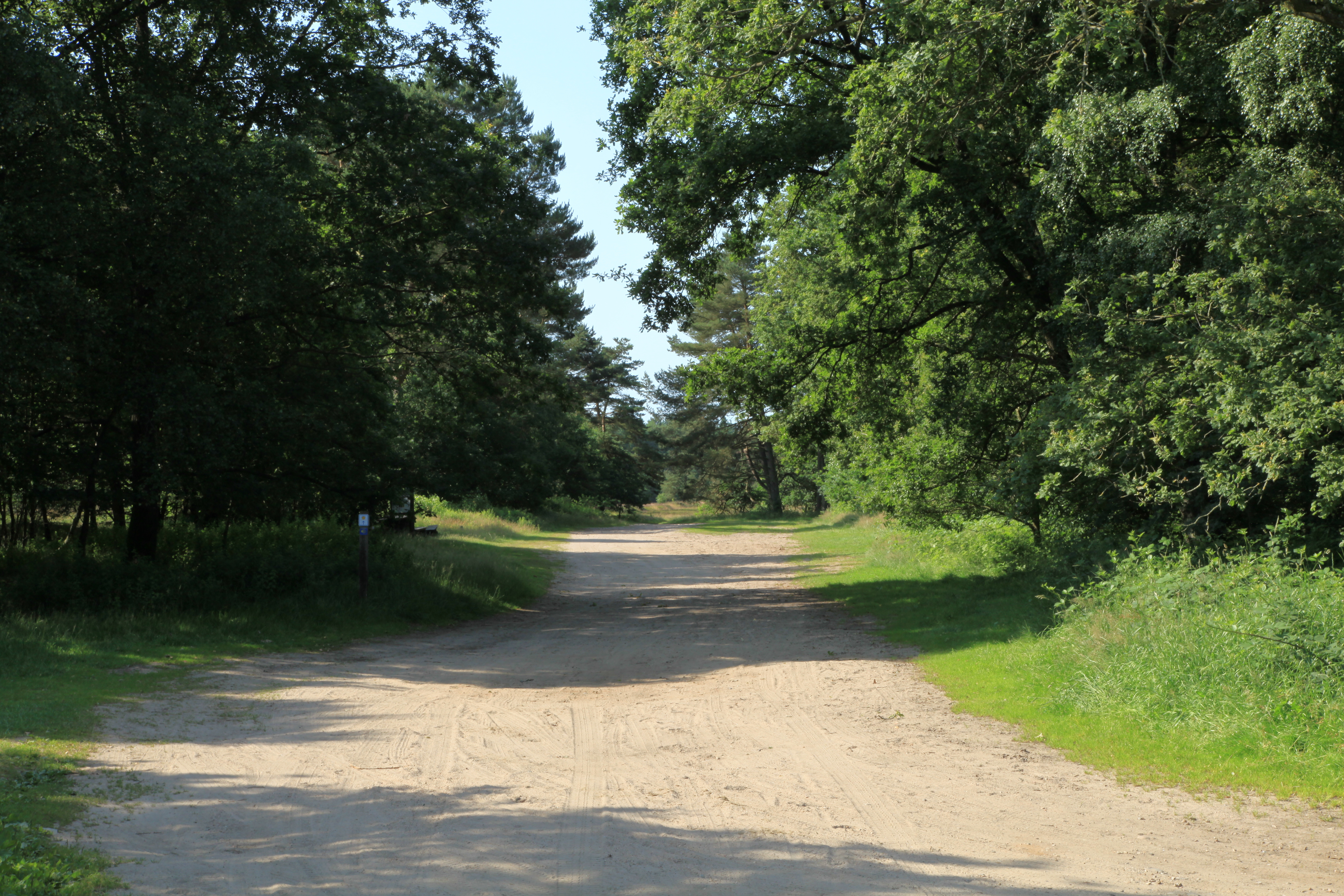 Ochsenweg auf der Grenze von Tetenhusen und Owschlag